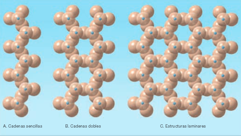 efewdsoi